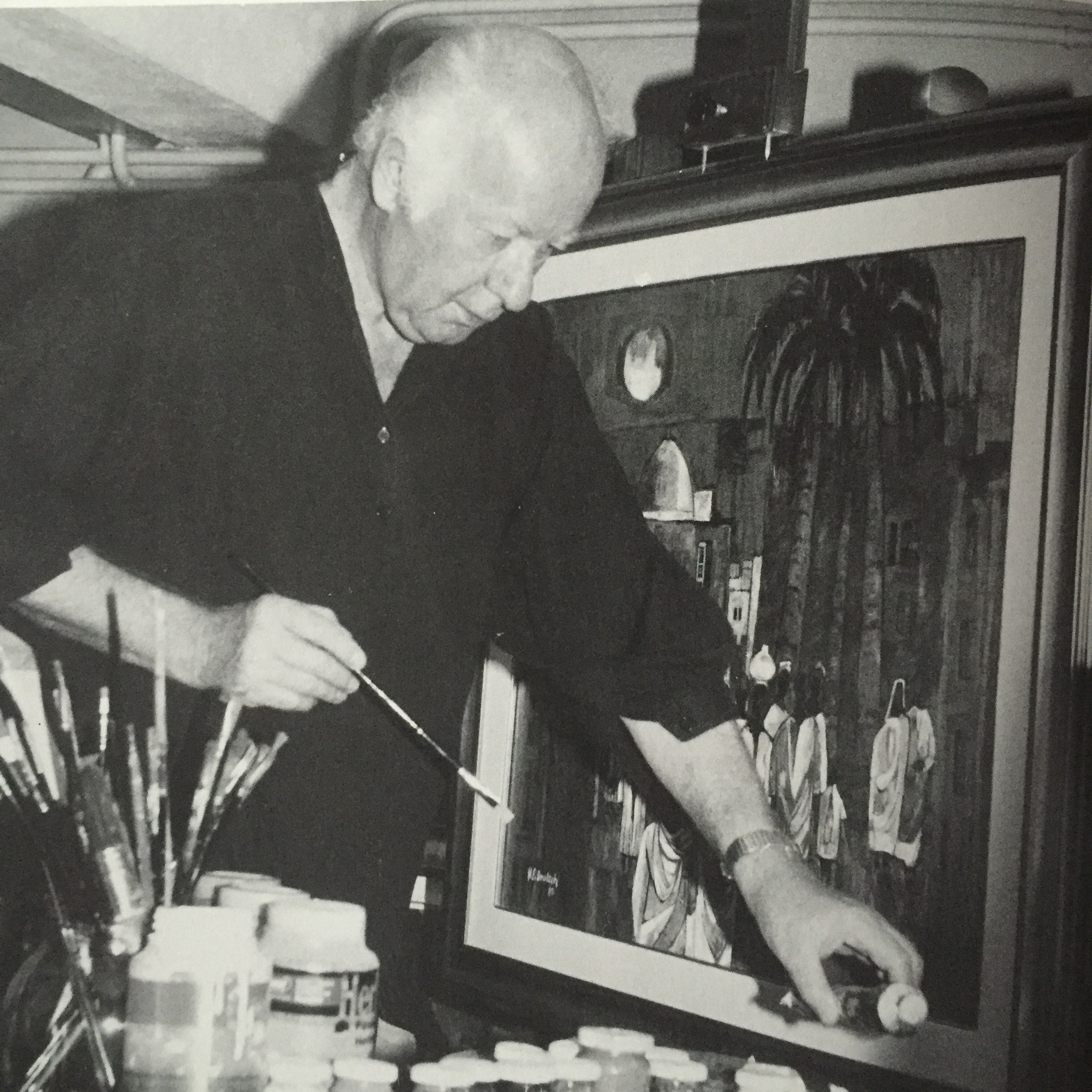 Der Künstler Hans E. Deutsch